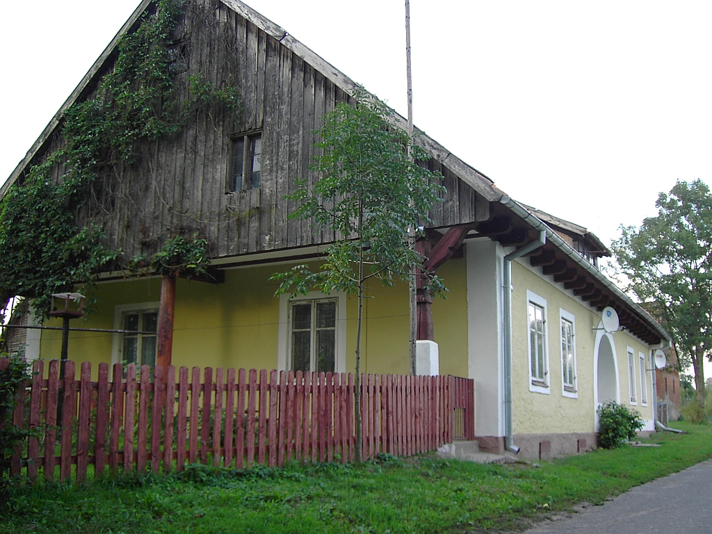 Chata w miejscowości Suczki na Mazurach.